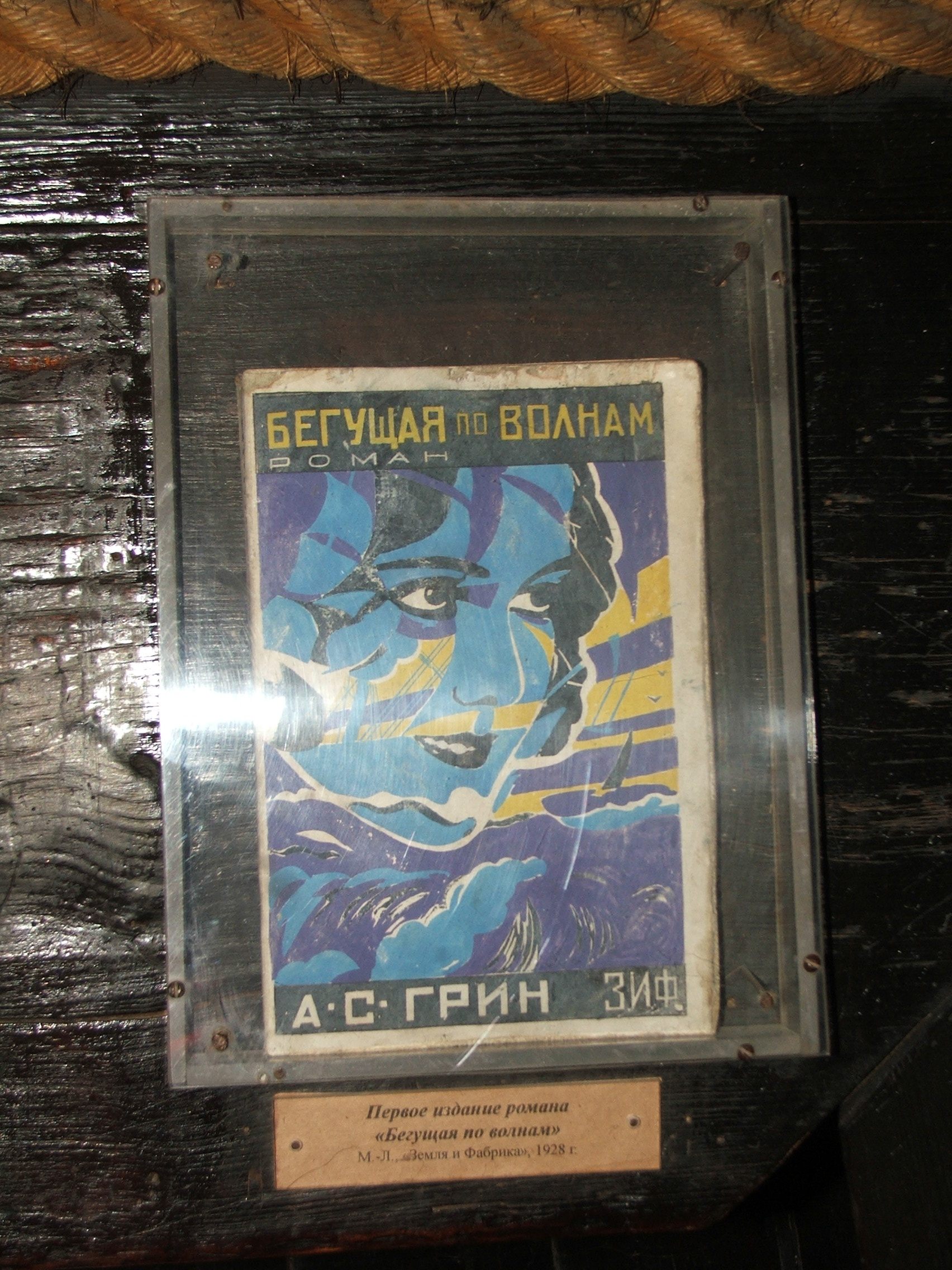 Будинок-музей О. С. Гріна, Феодосія, вул. Галерейна, 8–10, літ. А, А1, Б